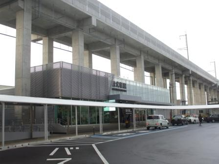 羽犬塚駅新駅舎